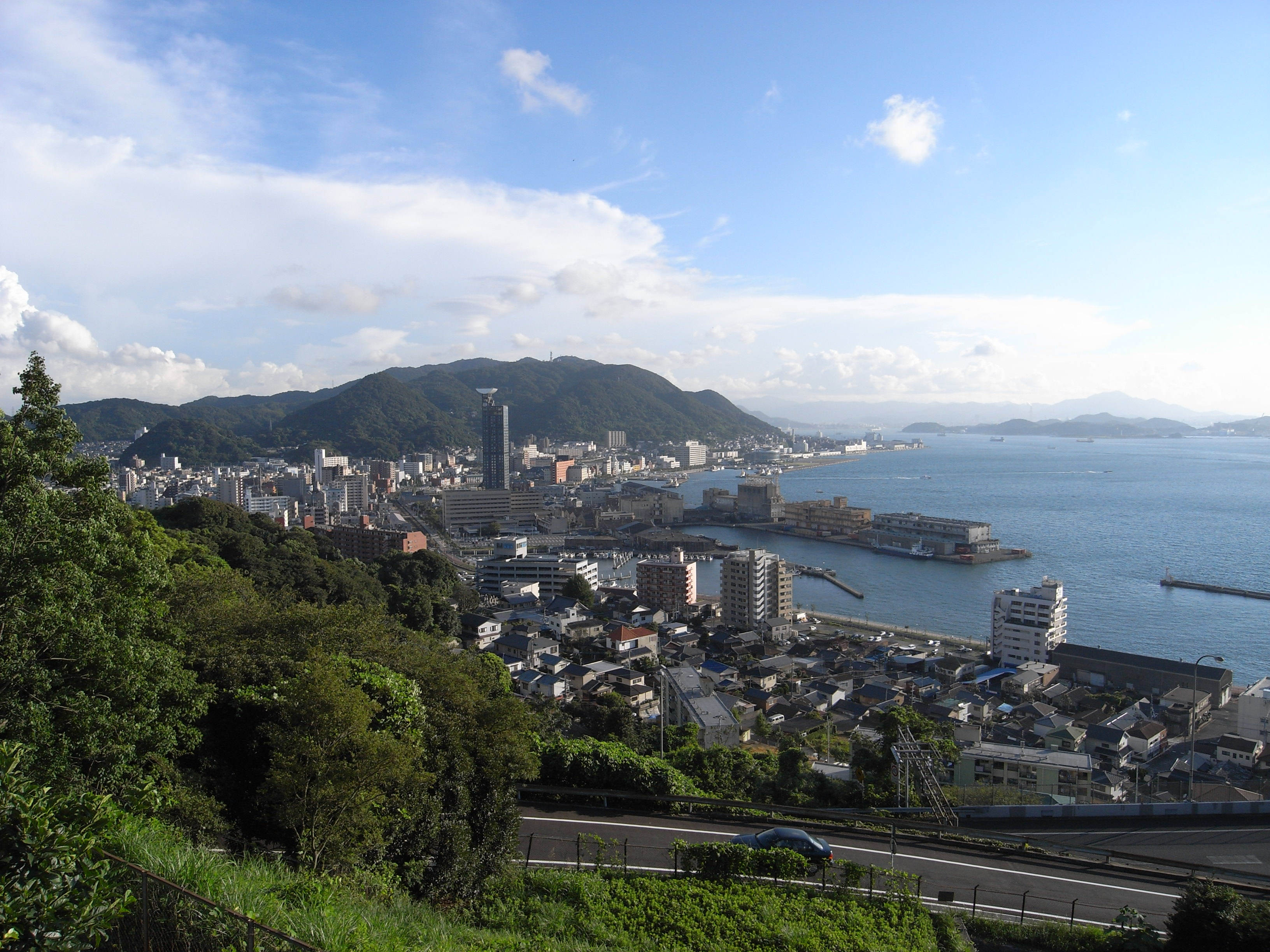 北九州市門司区門司港